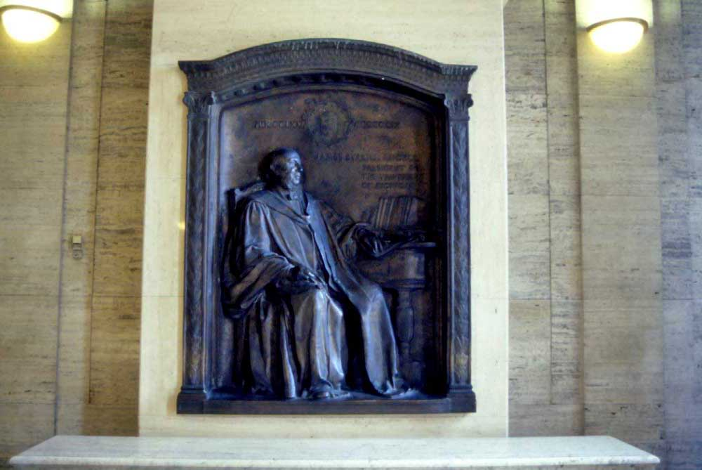 James Burrill Angell by Karl Bitter